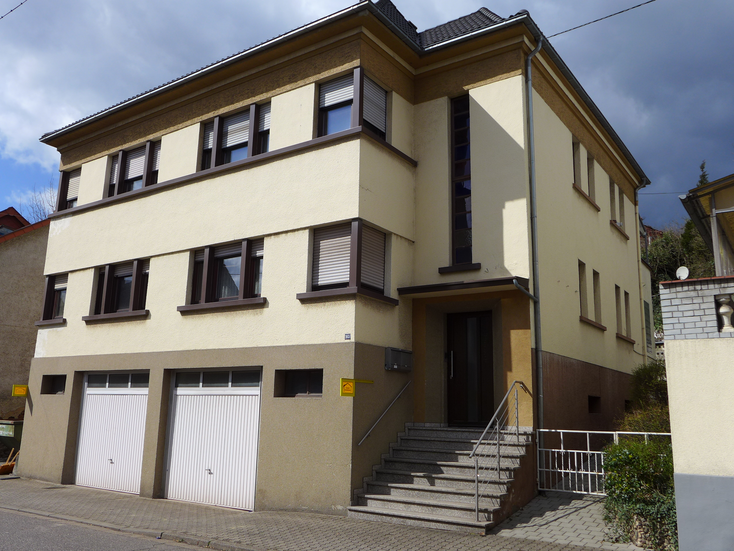 Diefflen, Wohnhaus in der Nalbacher Straße (ehemals "Kirchenweg"), Standort der früheren Wendelinuskapelle